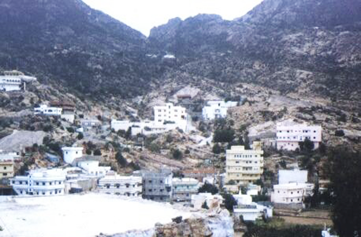 منظر جانبي